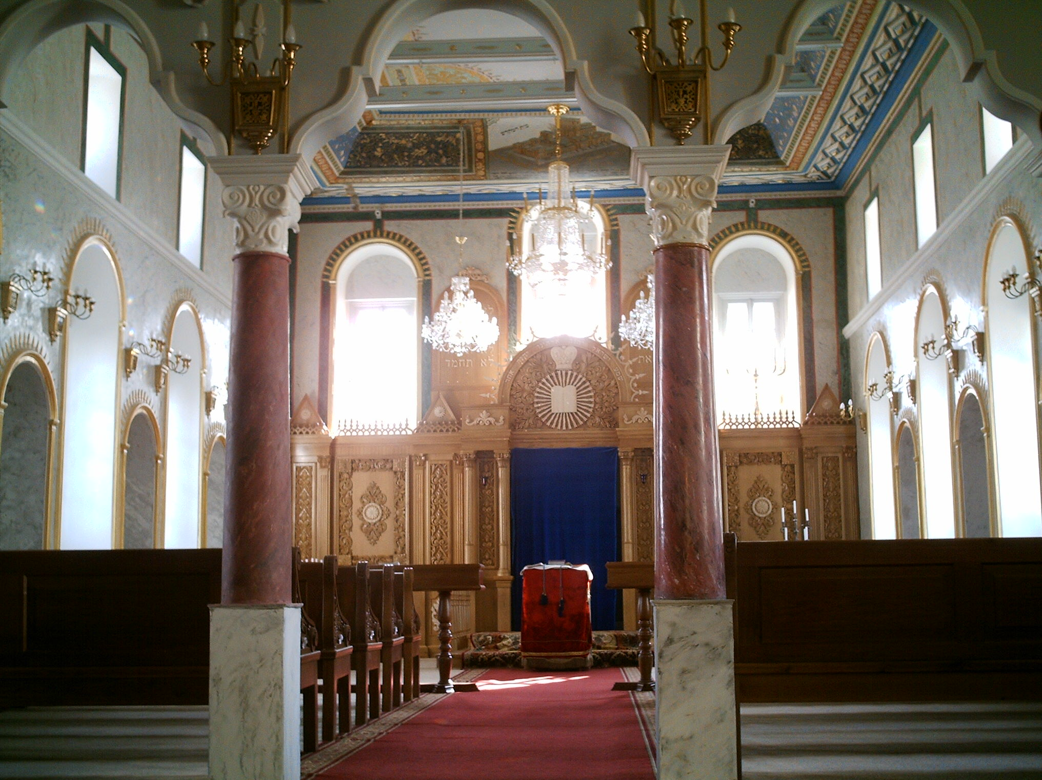 Большая кенаса Интерьер Большой праздничной кенасы в Евпатории